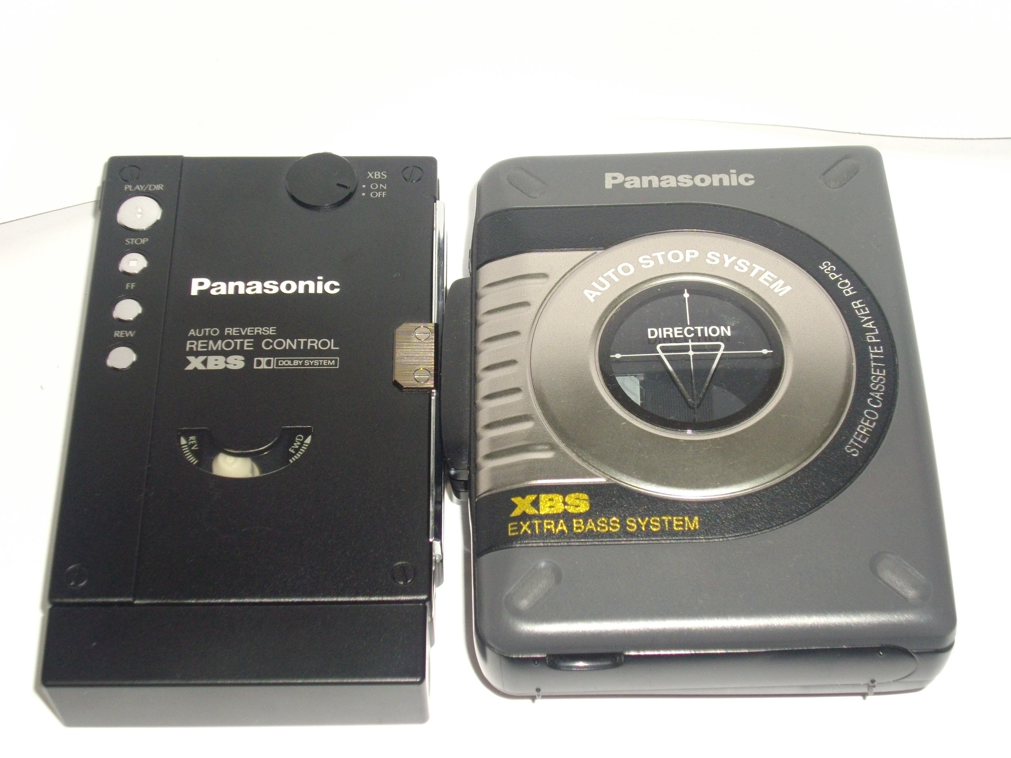 パナソニック製ステレオカセットプレーヤー RQ-JA160、RQ-P35